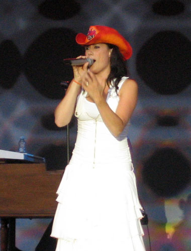 Jill Johnsson i Örebro under Rocktåget 2006